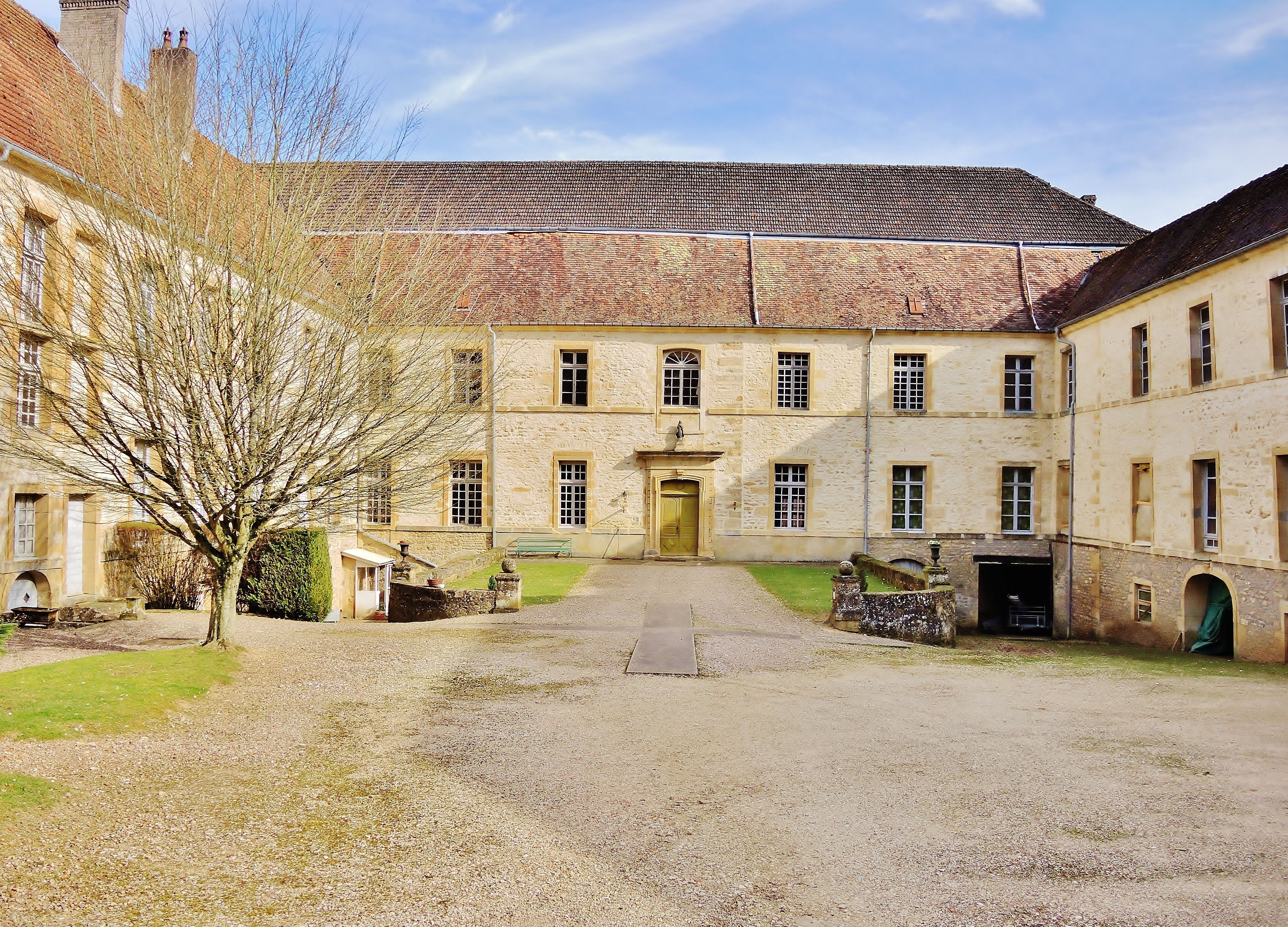 Prieuré de La Roche-Morey